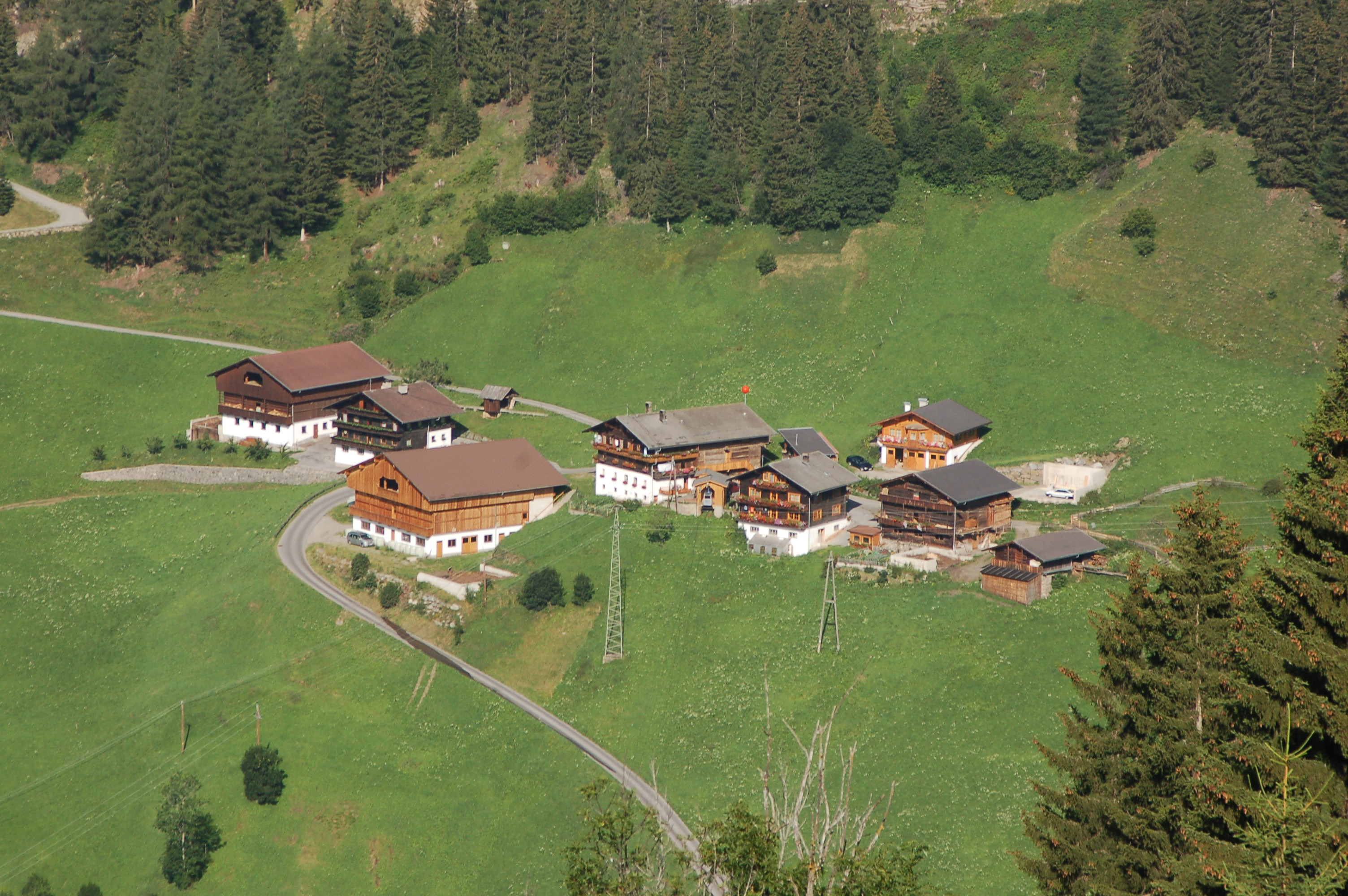 Der Weiler Berg der Fraktion Welzelach (Gemeinde Virgen), gesehen von Osten vom Hof Budam